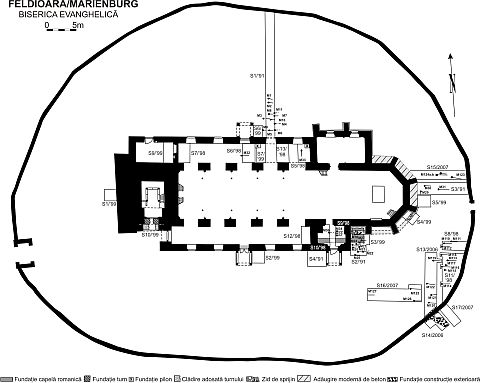 Planul bisericii evanghelice din Feldioara, Brasov.